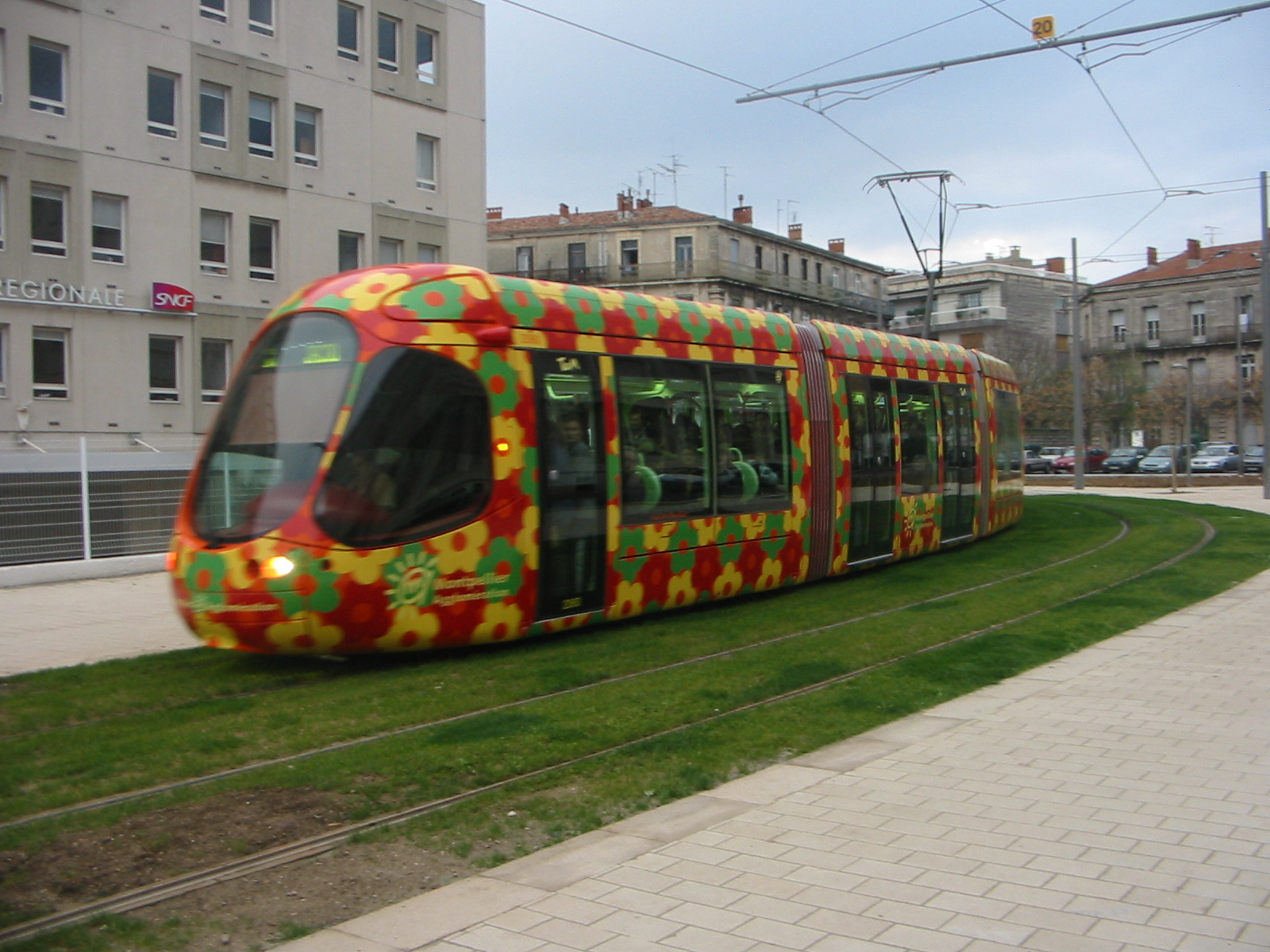 Tramway de Montpellier - Ligne 2